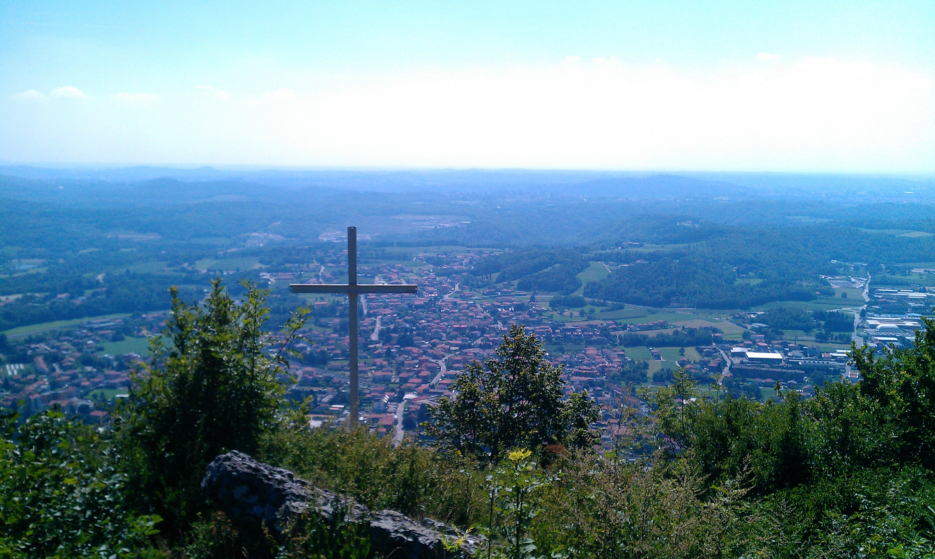 Vista di Arcisate e del resto del panorama della provincia di Varese dal monte Crocino.